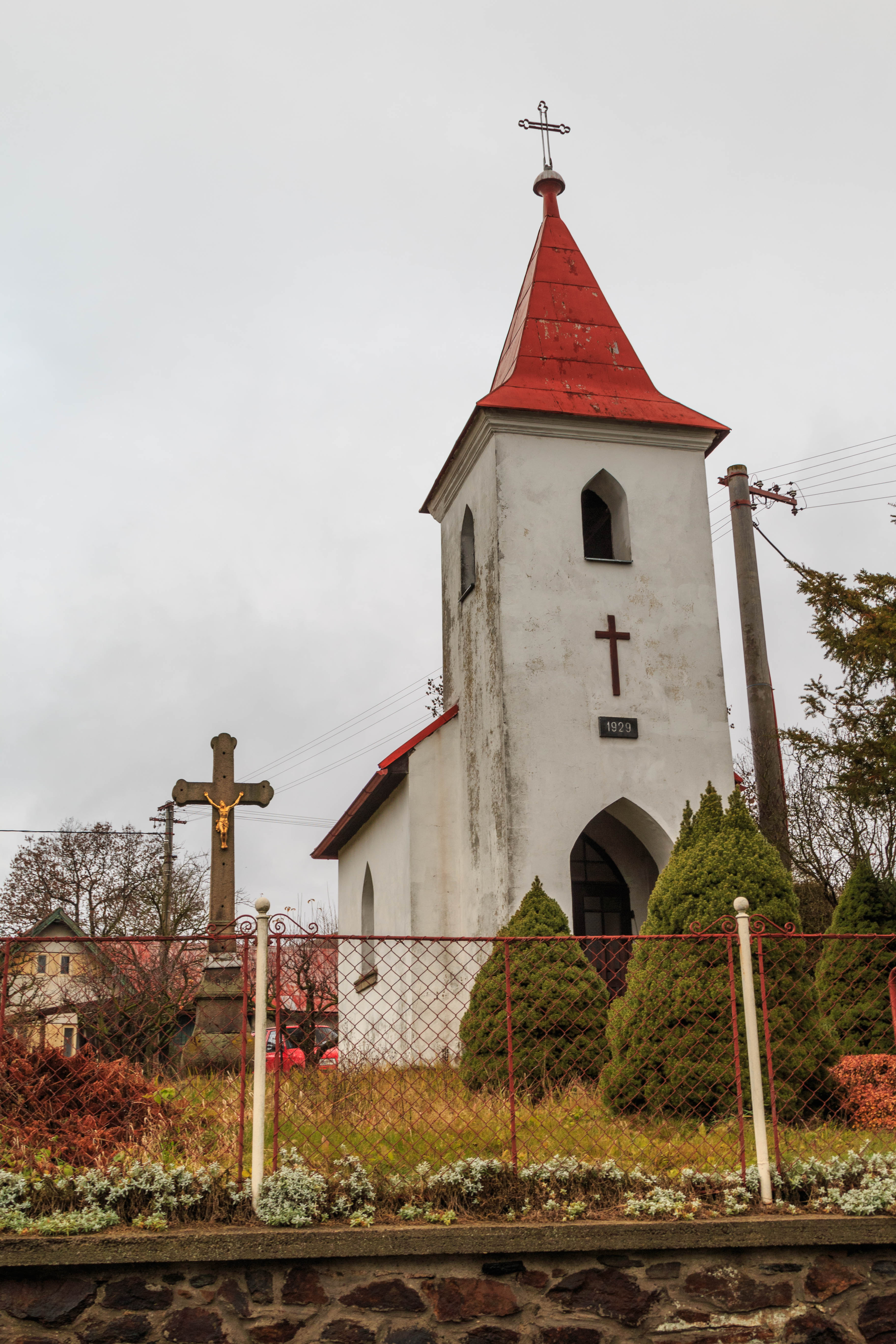 Tis kaplička